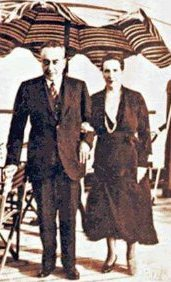 Graciela Fehrman Martínez​ (2 de octubre de 1888 - 11 de septiembre de 1965)​ fue la cónyuge de Juan Esteban Montero y Primera dama entre 1931 a 1932.